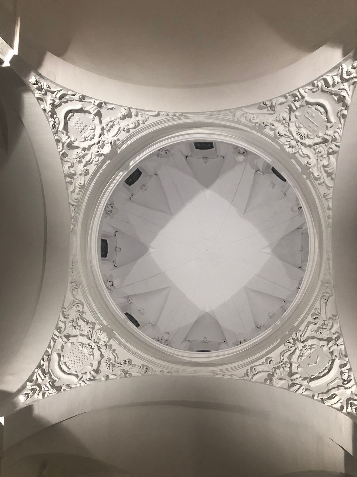 Actualment es conserva així